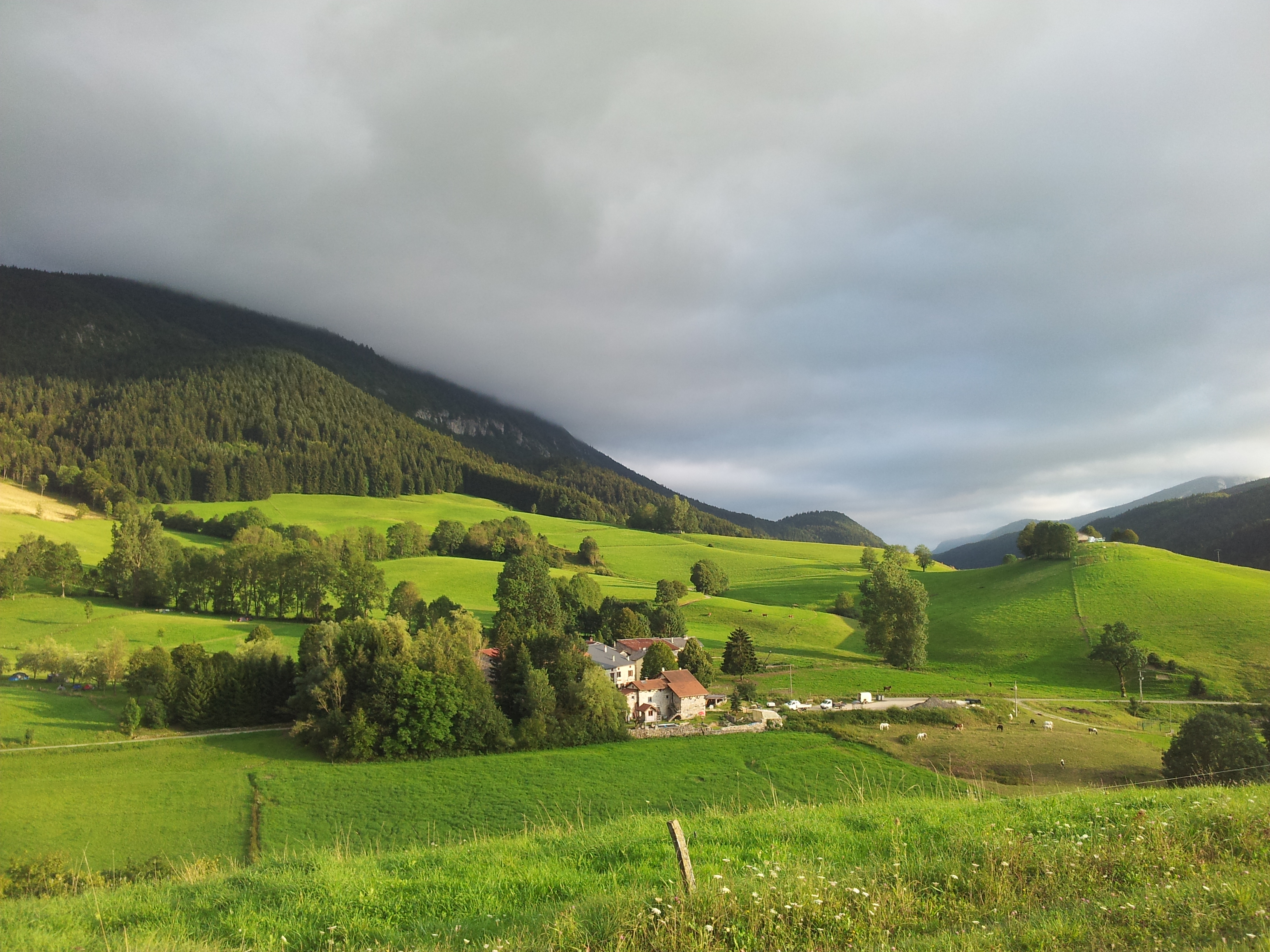 A côté de Saint-Martin-en-Vercors